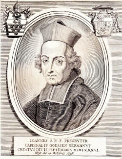 Kardinal Johann von Goess, Bischof von Gurk